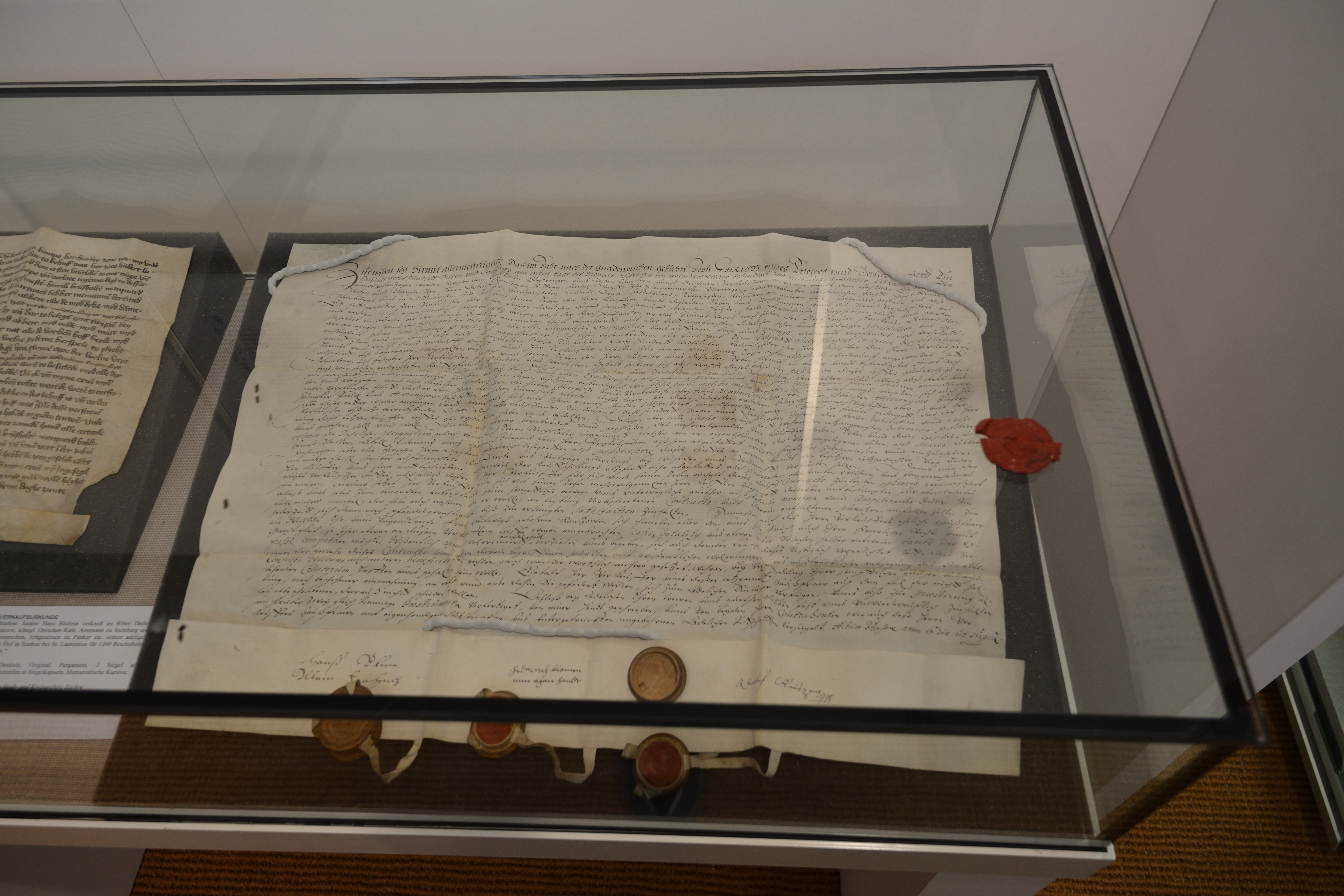 Eine Verkaufsurkunde zu Gunsten von Detlev Rantzau, aus dem Kreisarchiv Itzehoe.